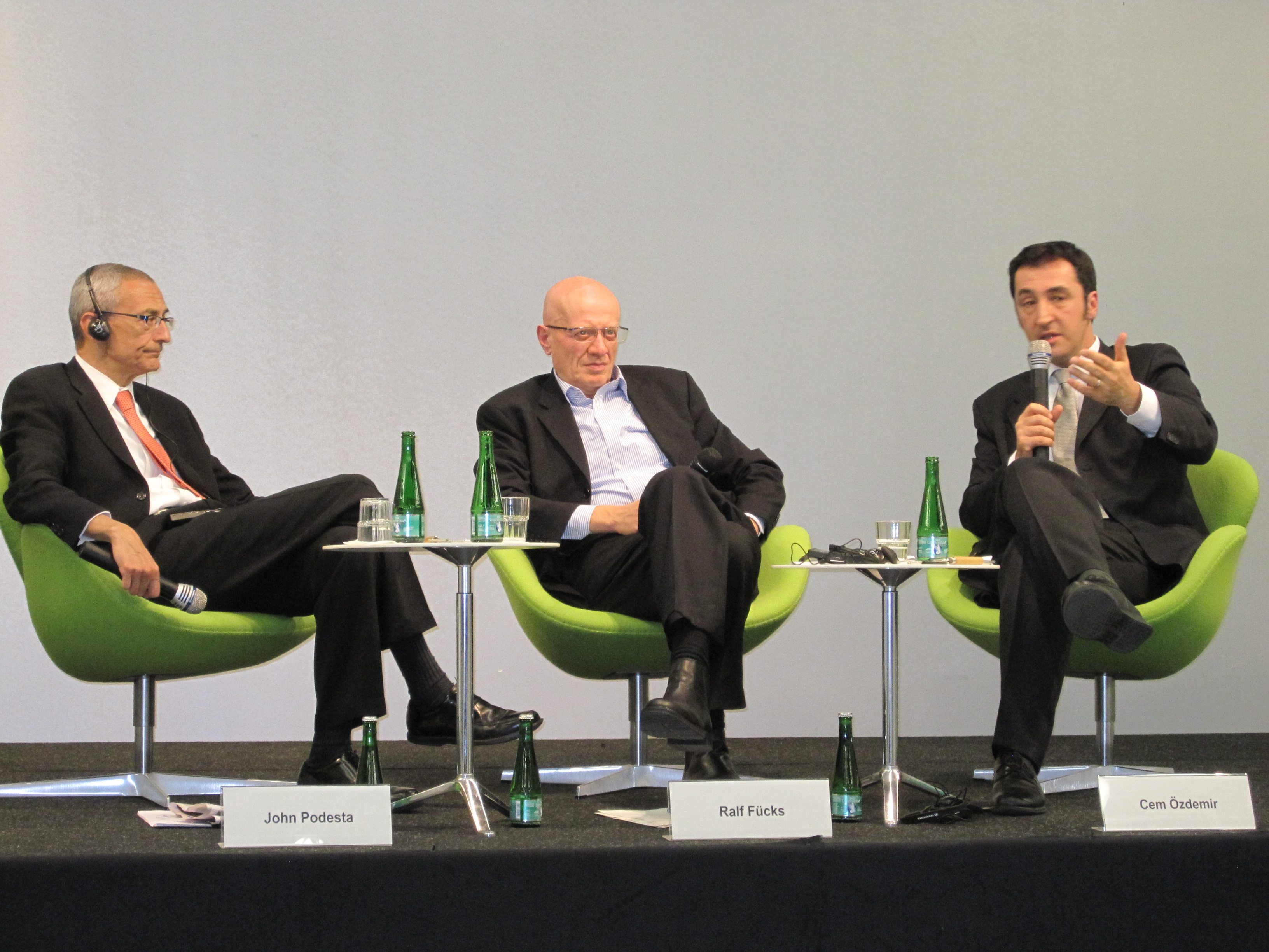 John Podesta, Ralf Fücks, Cem Özdemir